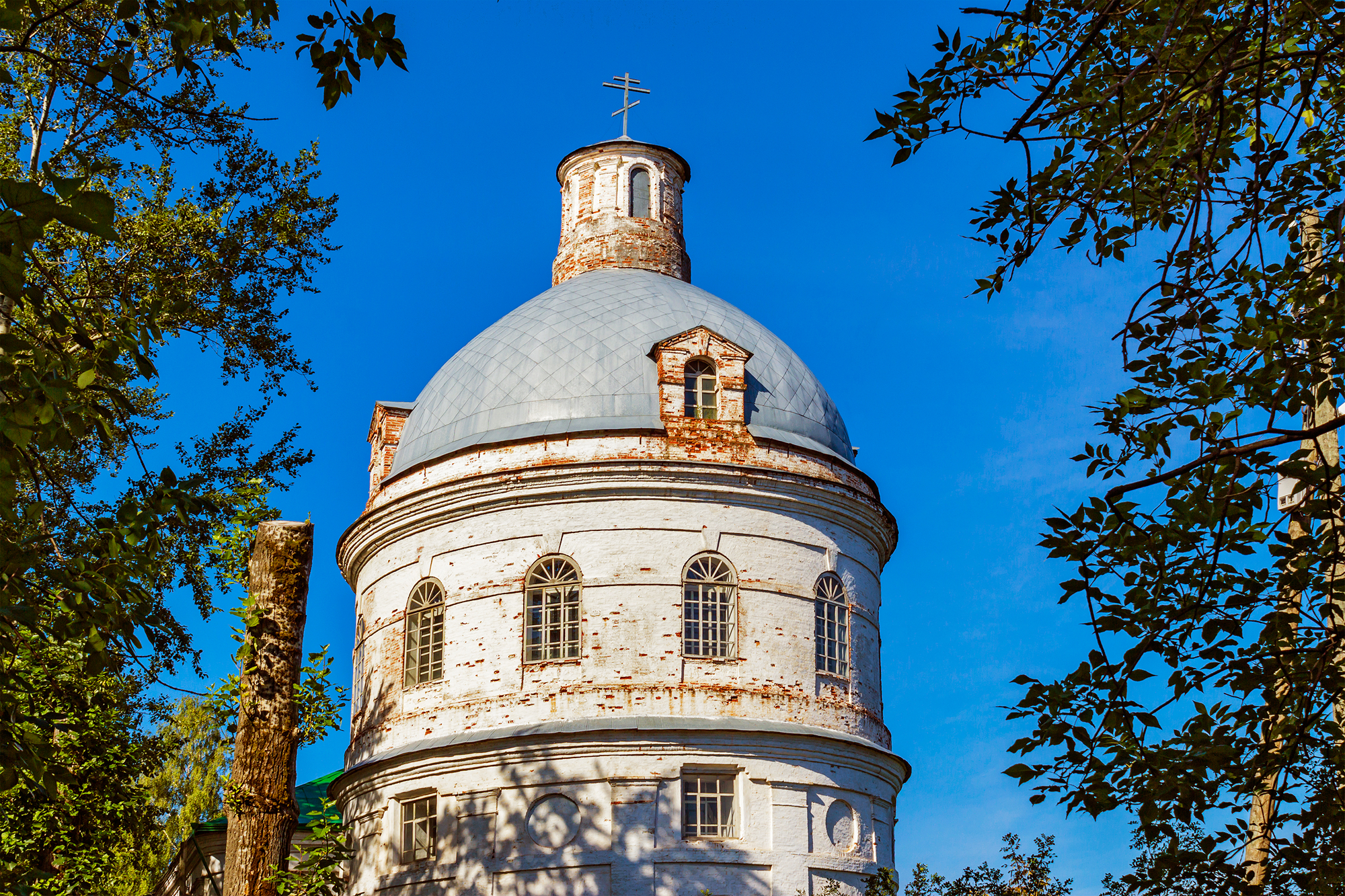 Церковь Тихона Задонского: улица Ленина, 2а, Карагай, Карагайский район, Пермский край